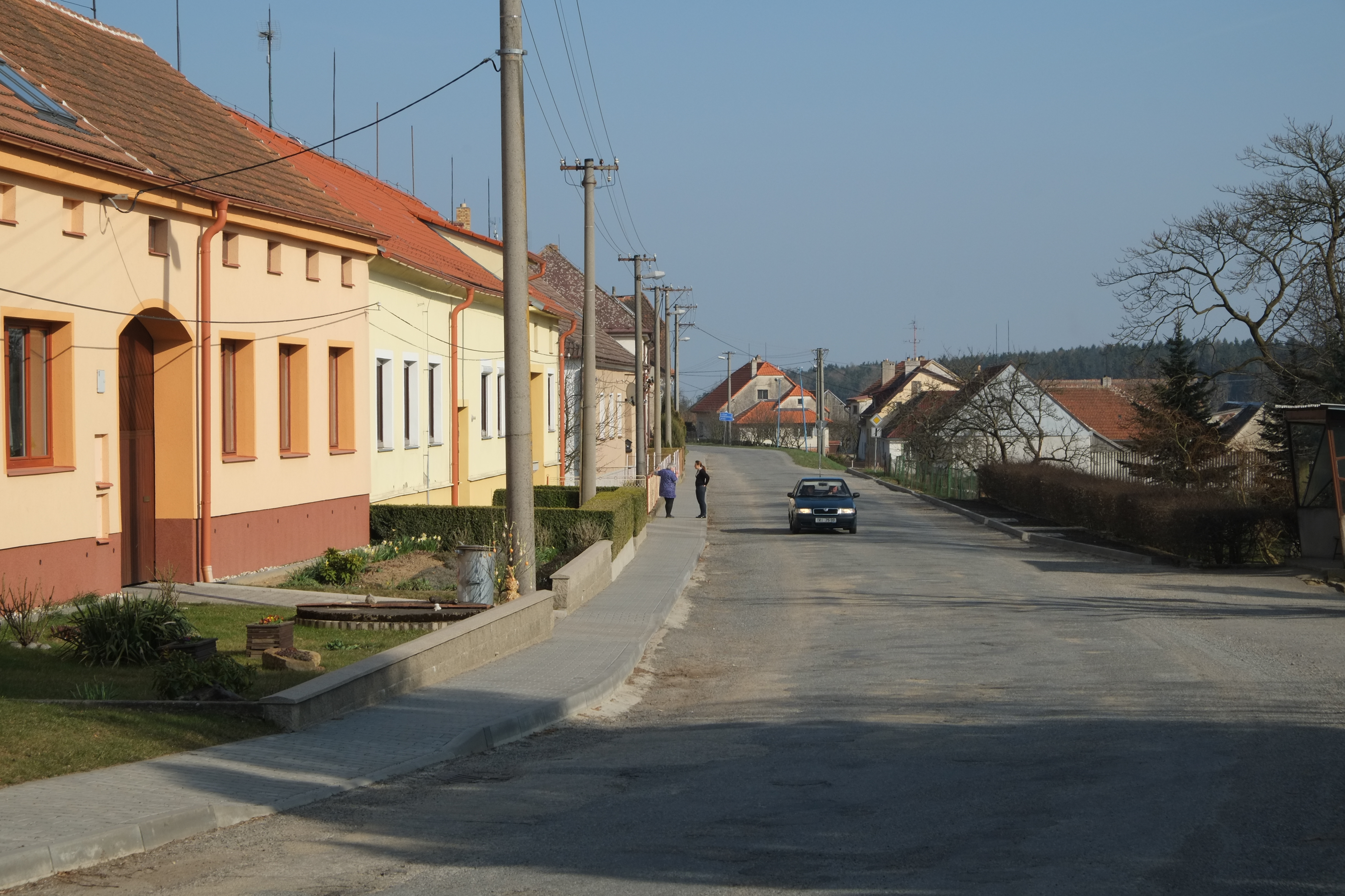 Vranín (Mor. Budějovice), auto